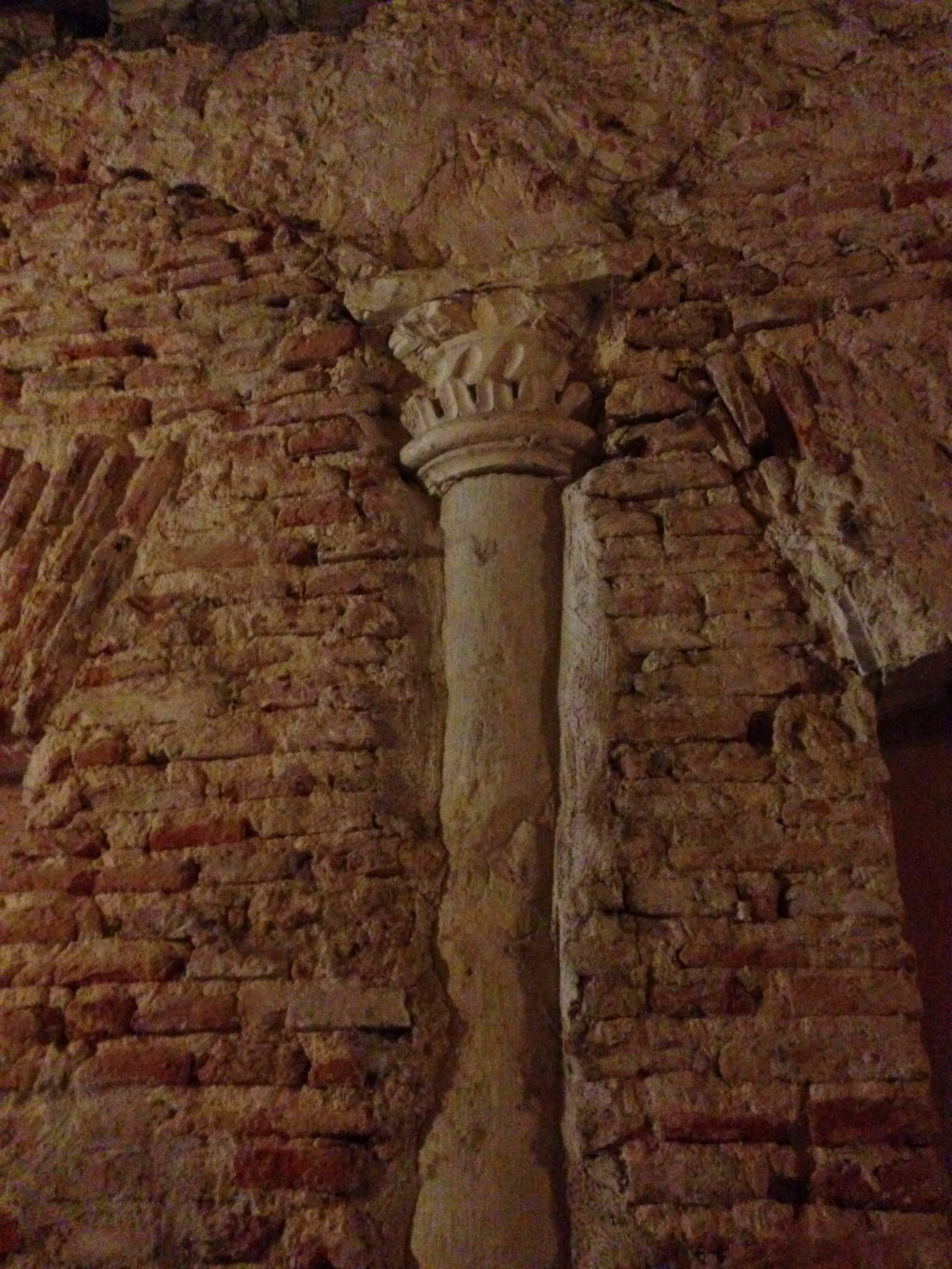 Claustro Enfermería